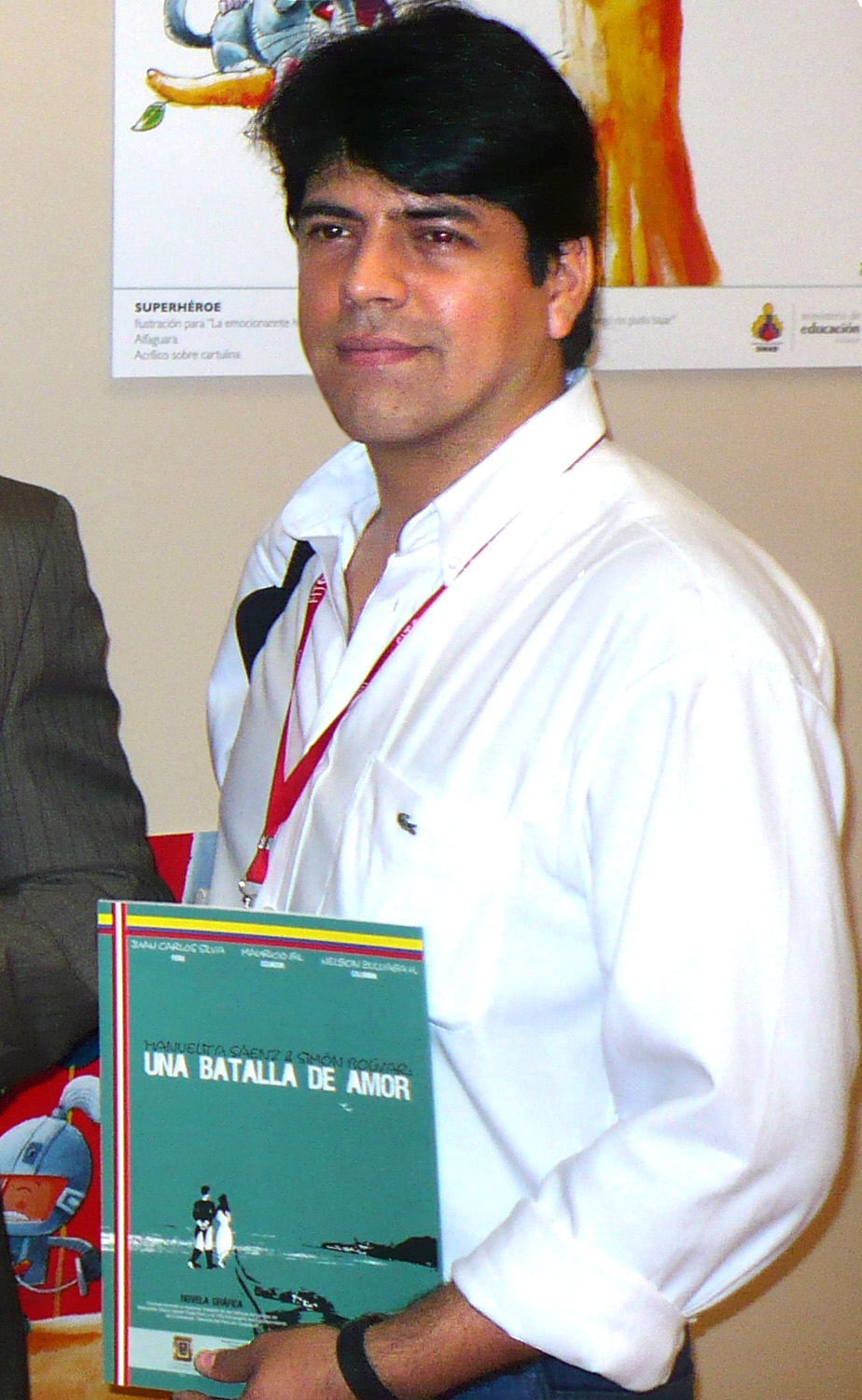 Foto de la novela grafica "Una Batalla de Amor".